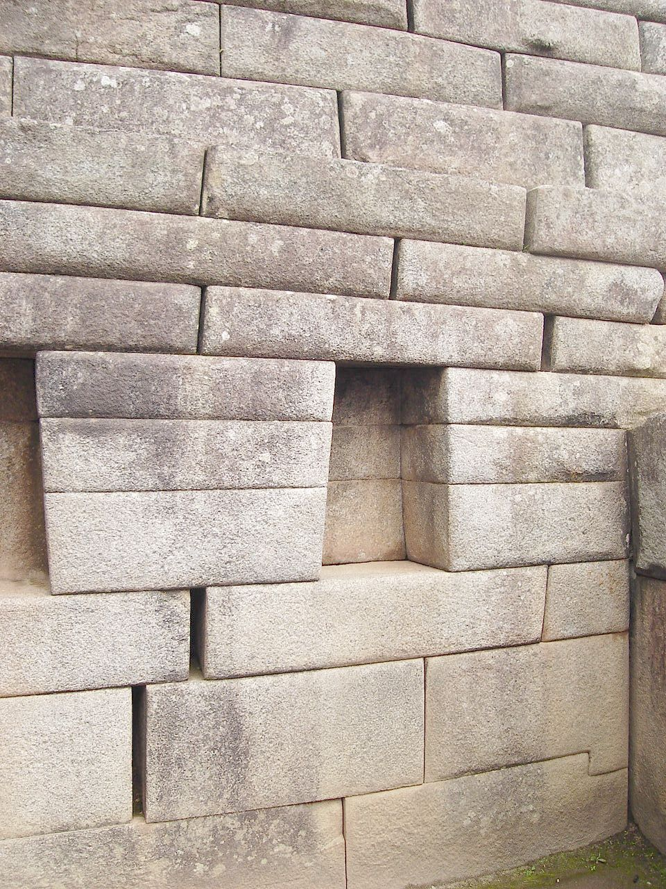 Foto tirada por mim, em Machu Picchu.